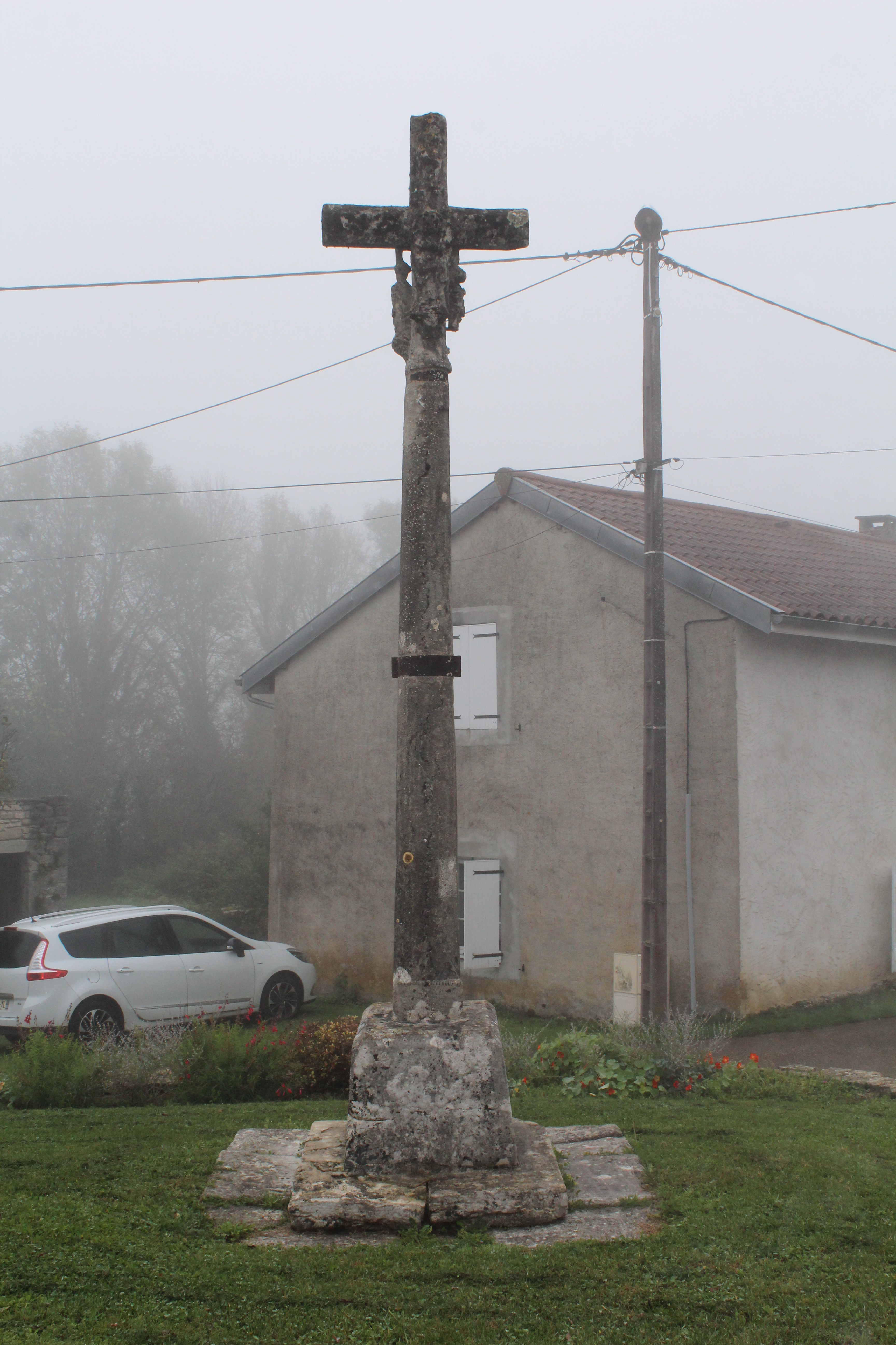 Croix de Thoissia.